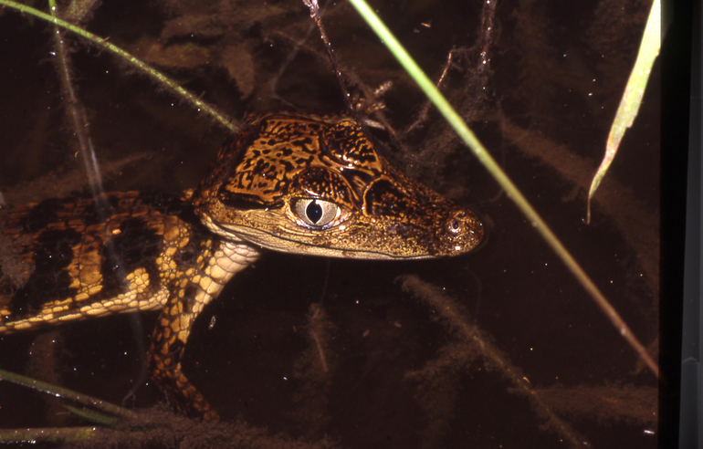 Caiman crocodilus